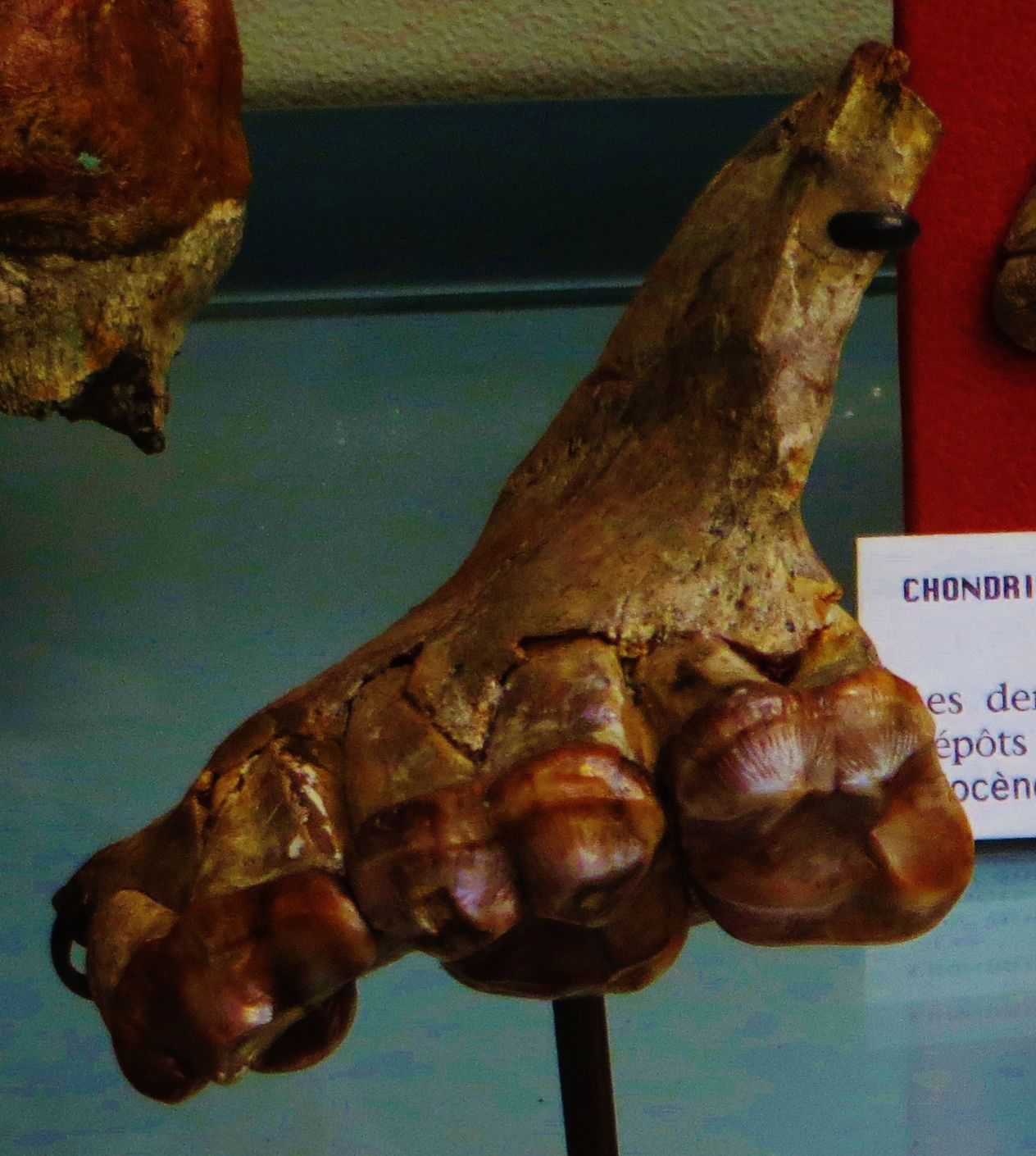 Fossil of Agriotherium, an extinct mammal - Took the photo at Museum Histoire Naturelle, Paris